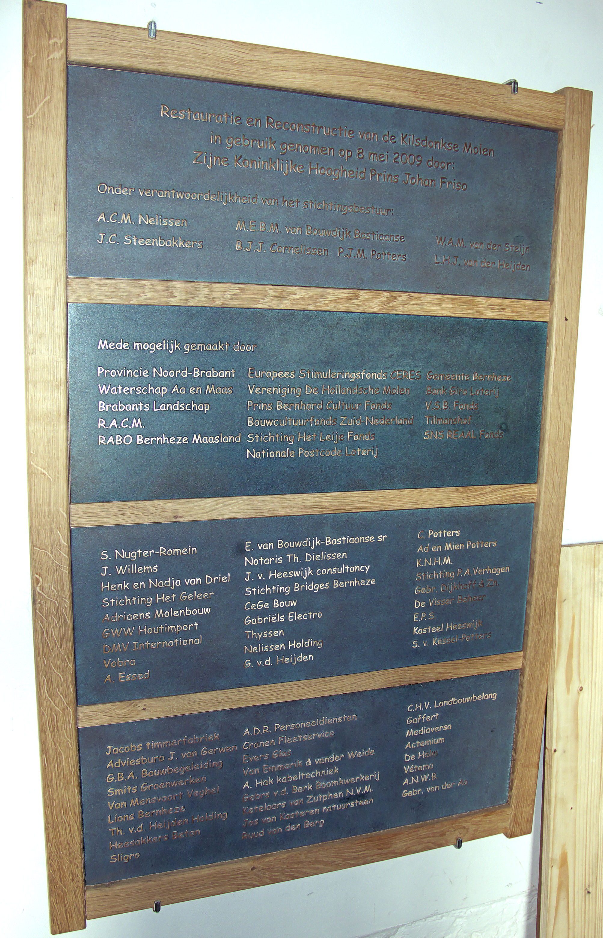 Kilsdonkse molen, Dinther, deelnemers restauratie